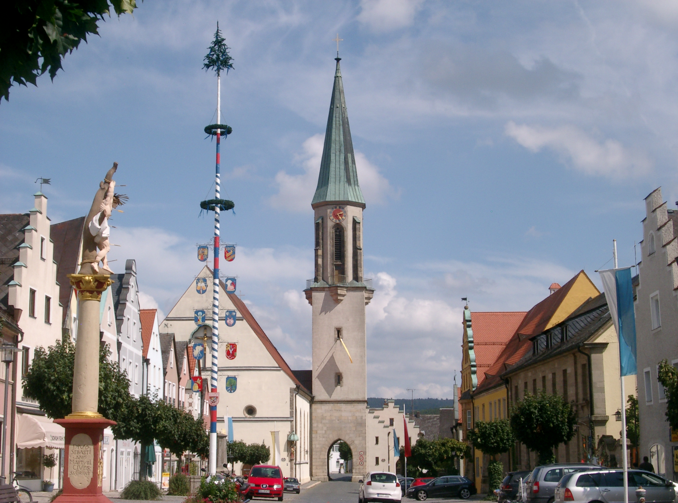 Ensemble Altstadt Kemnath mit Pfarrkirche Mariä HimmelfahrtThis is a photograph of an architectural monument.